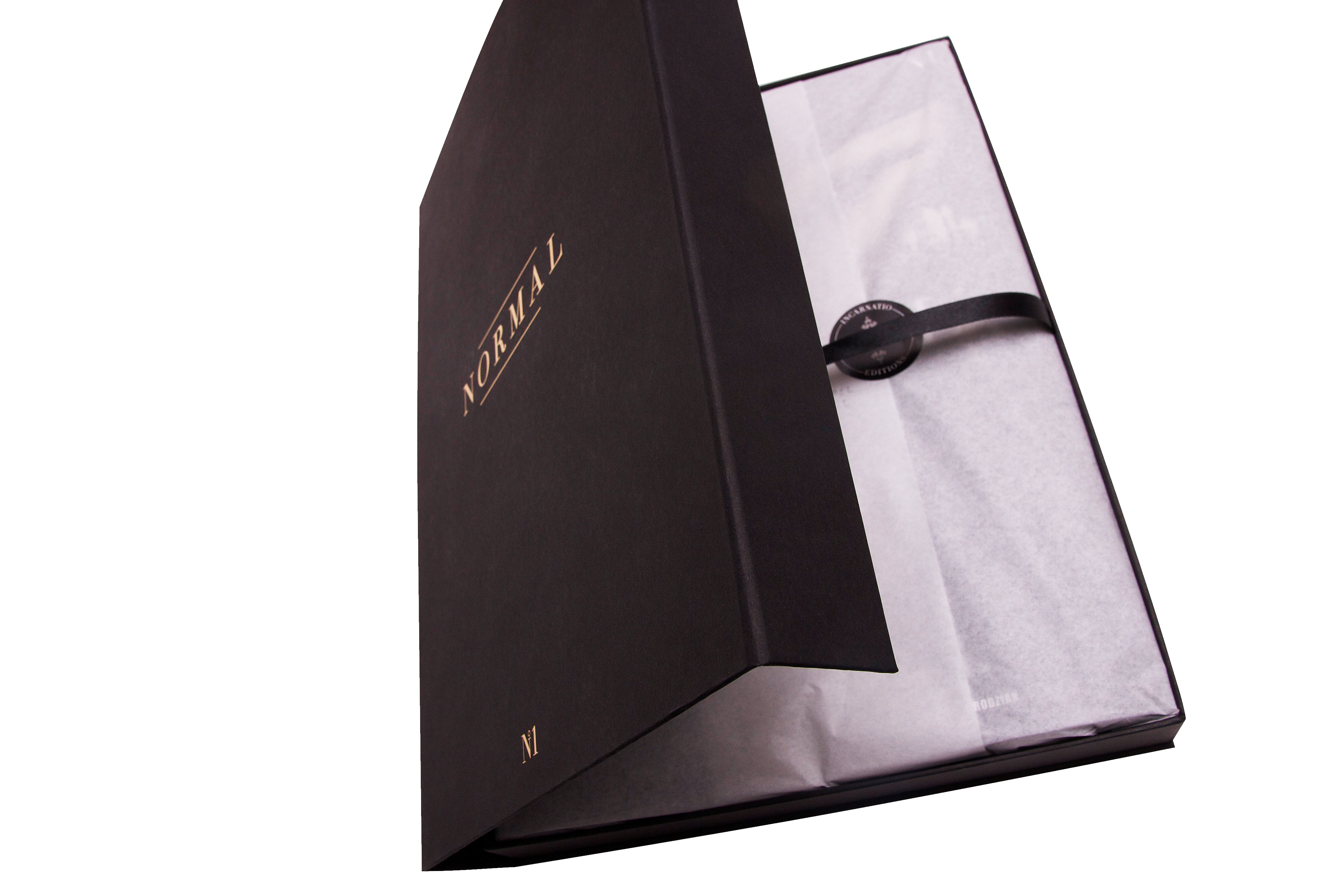 Coffret Normal Magazine n)°1 hors sérié (200ex.)